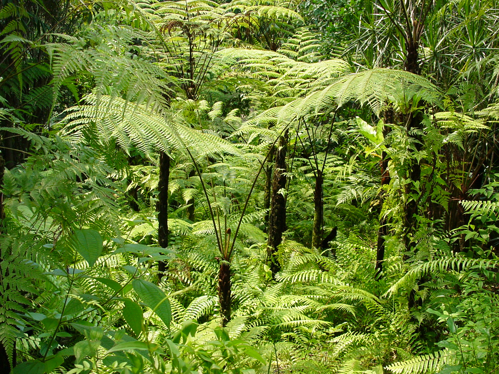 Zürich Zoo Masoalahalle